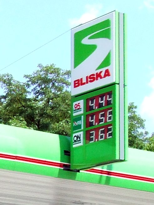 Logo oraz tablica z ceną paliw na stacji Bliska